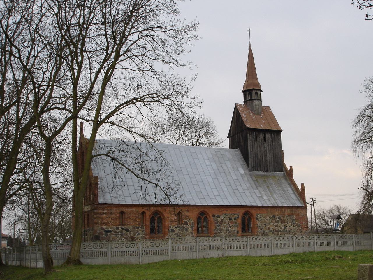 Skalin (powiat stargardzki) - kościół pw. MB Różańcowej (zabytek nr rejestr. 480)